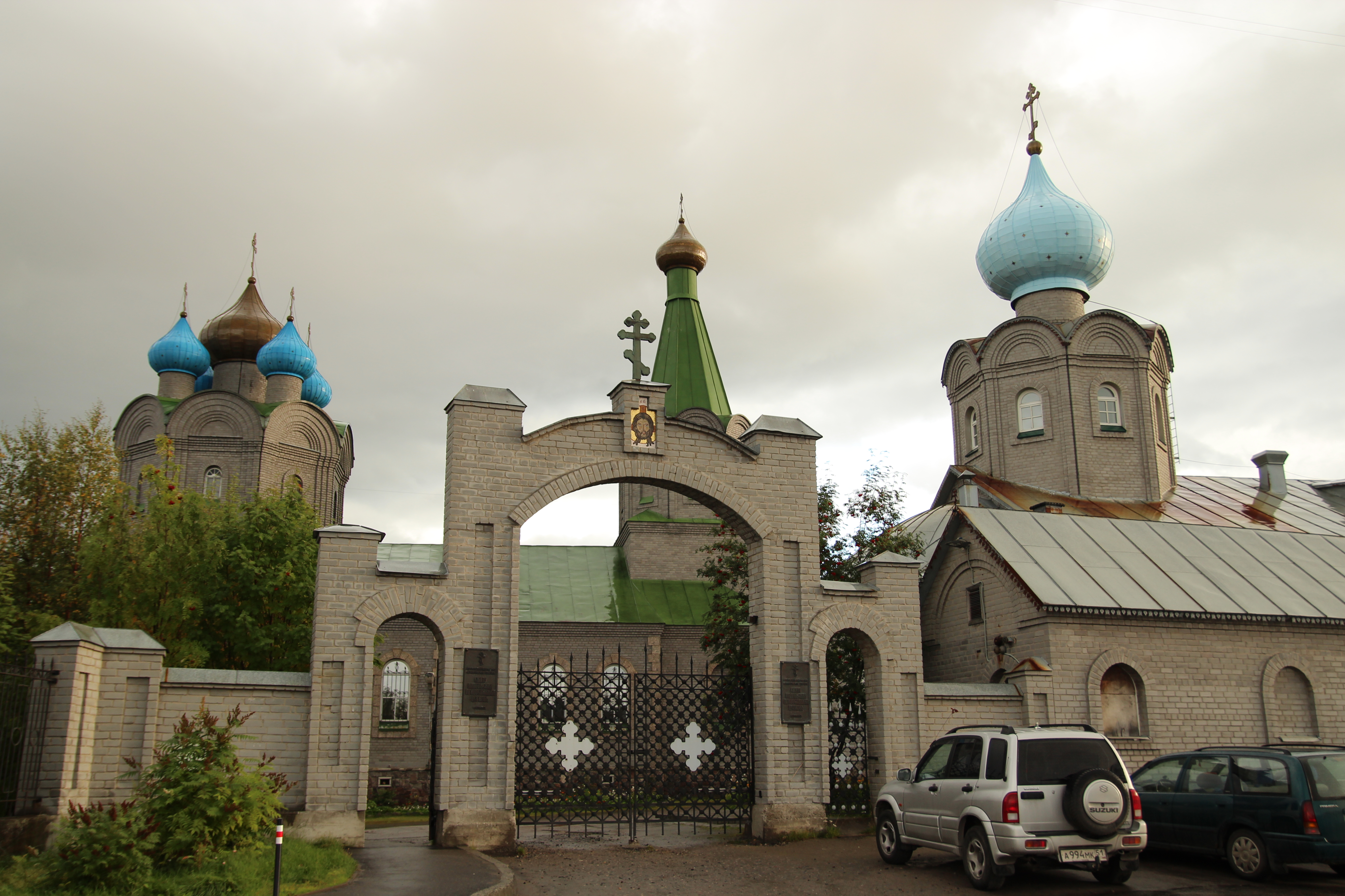 Комплекс Свято-Никольского кафедрального собора